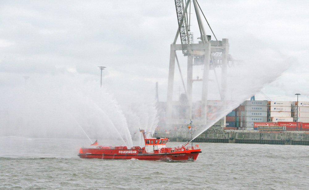 Das Feuerlöschboot "Krüger" im Einsatz im Hamburger Hafen.